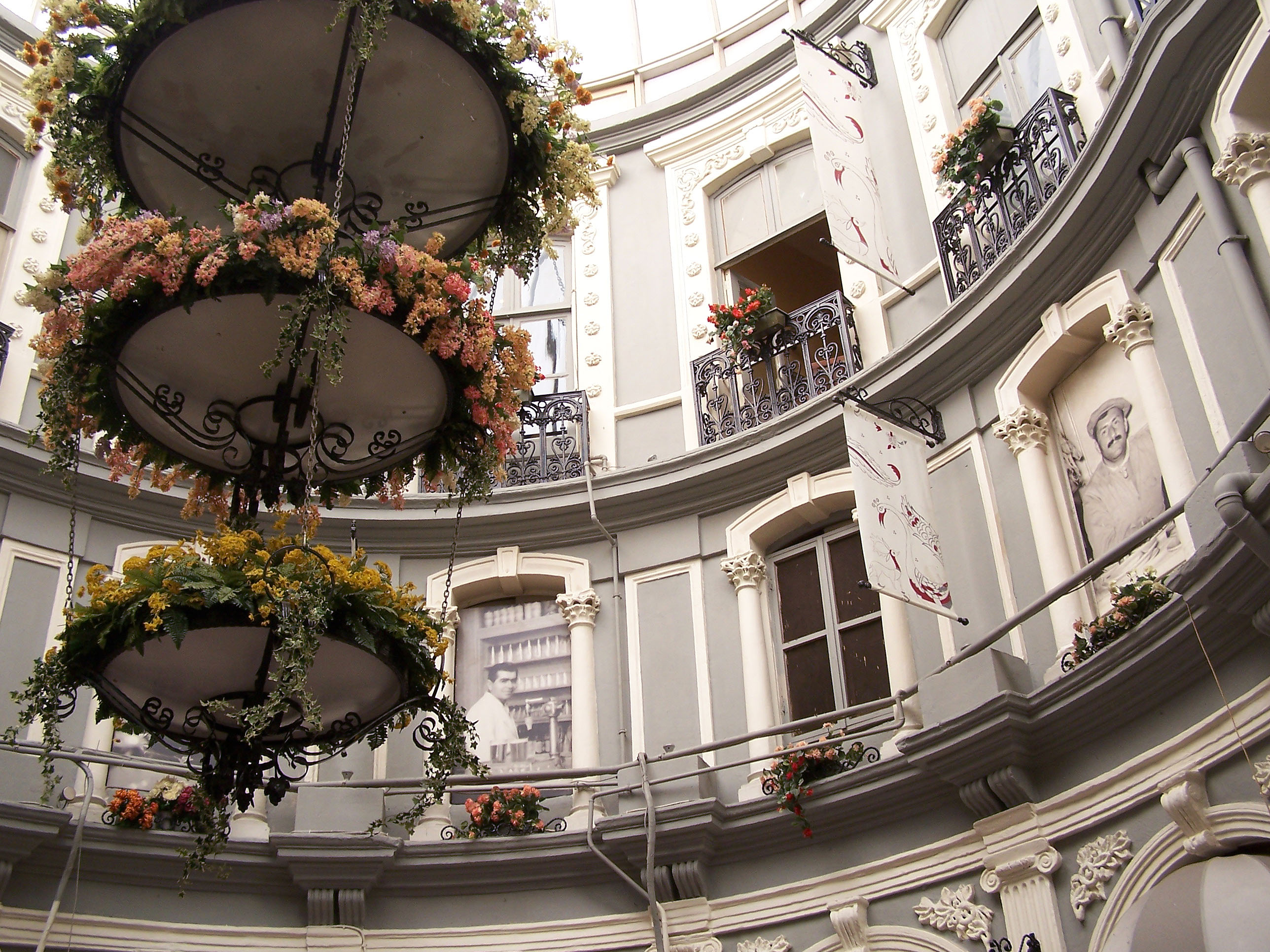 Inside Çiçek Pasajı at İstiklal Caddesi, Taksim, Beyoğlu